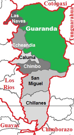 Localización del Cantón Guaranda en la Provincia de Bolívar, Ecuador.